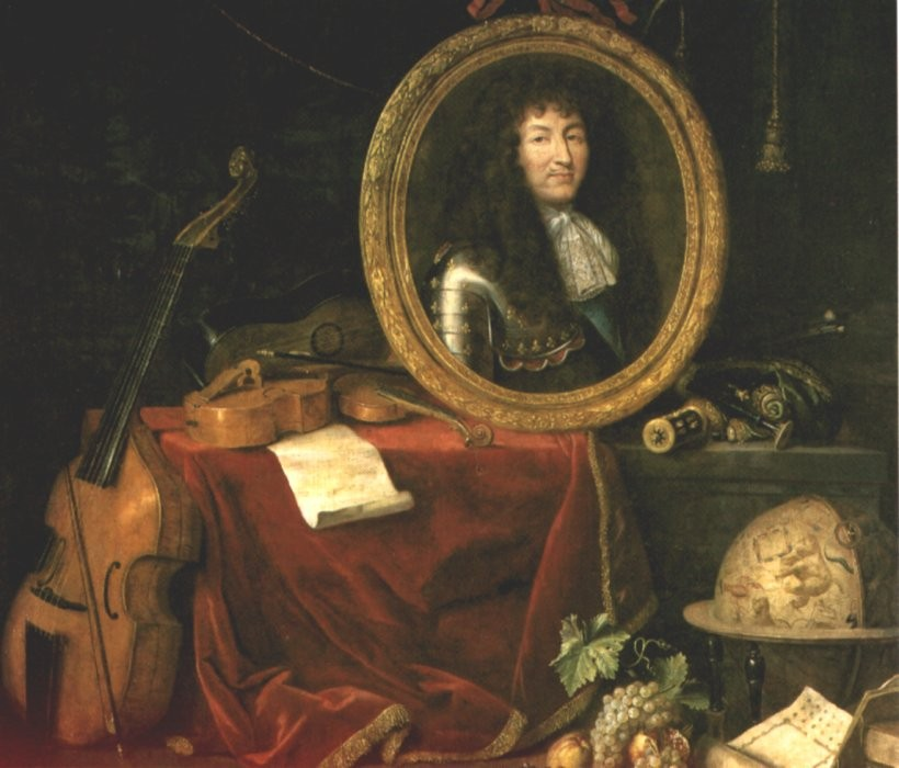 morceau de réception à l'Académie royale de peinture et de sculpture, 1672